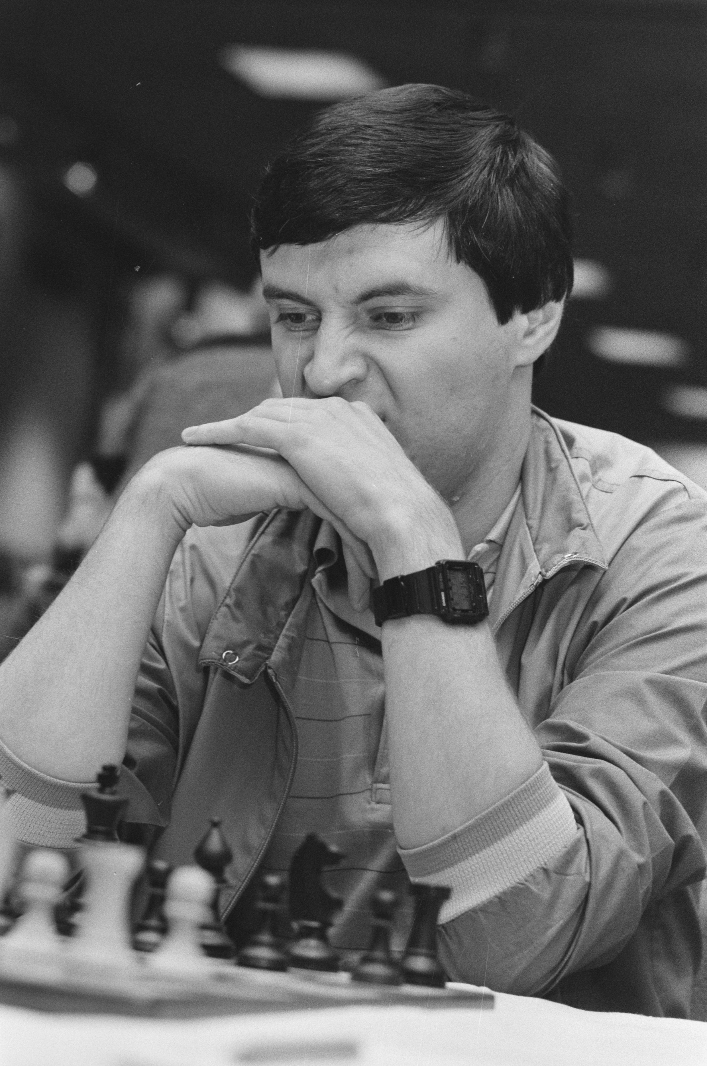 Alexander Chernin. OHRA schaaktoernooi 1987